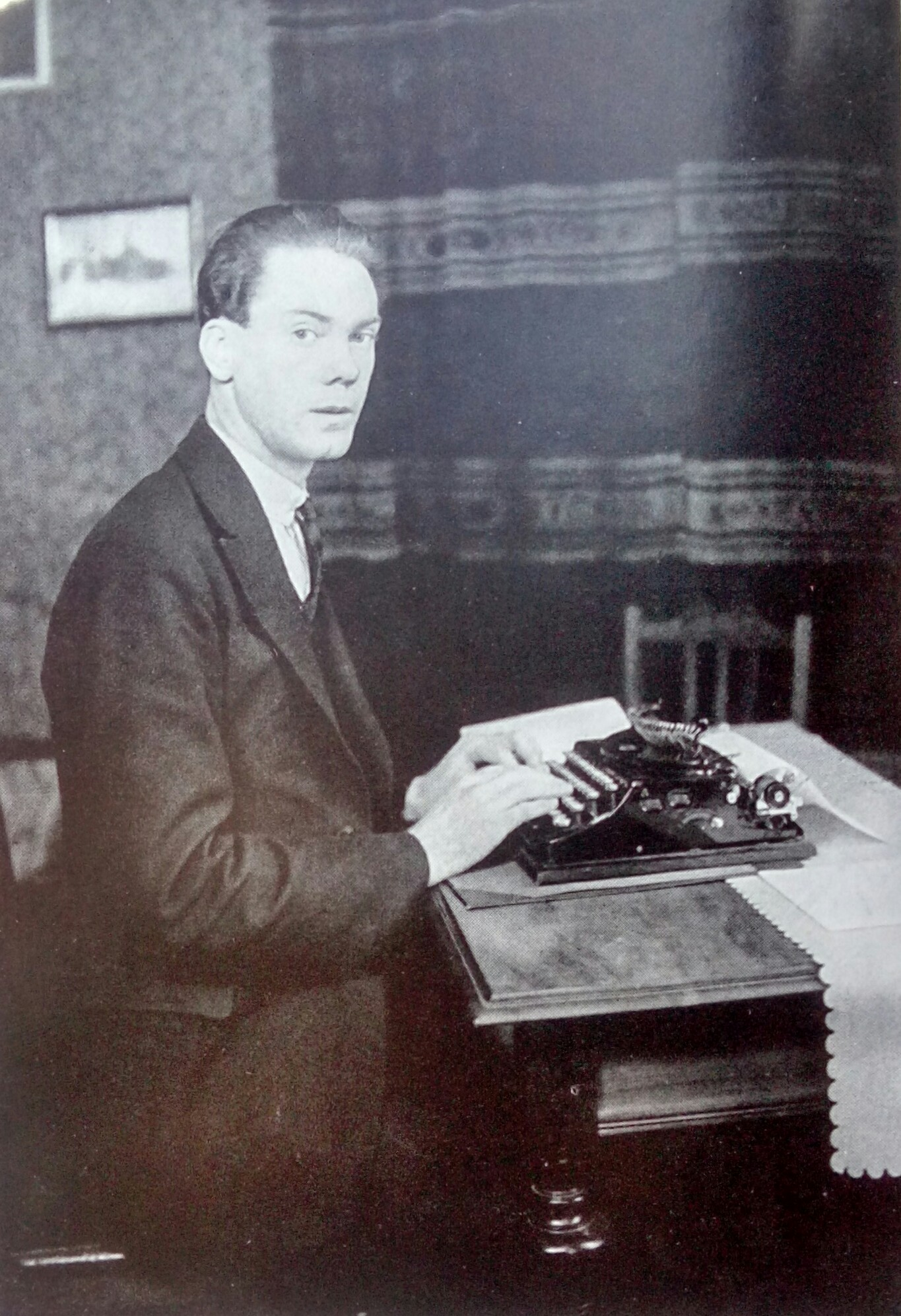 Författaren Artur Lundkvist 1931.